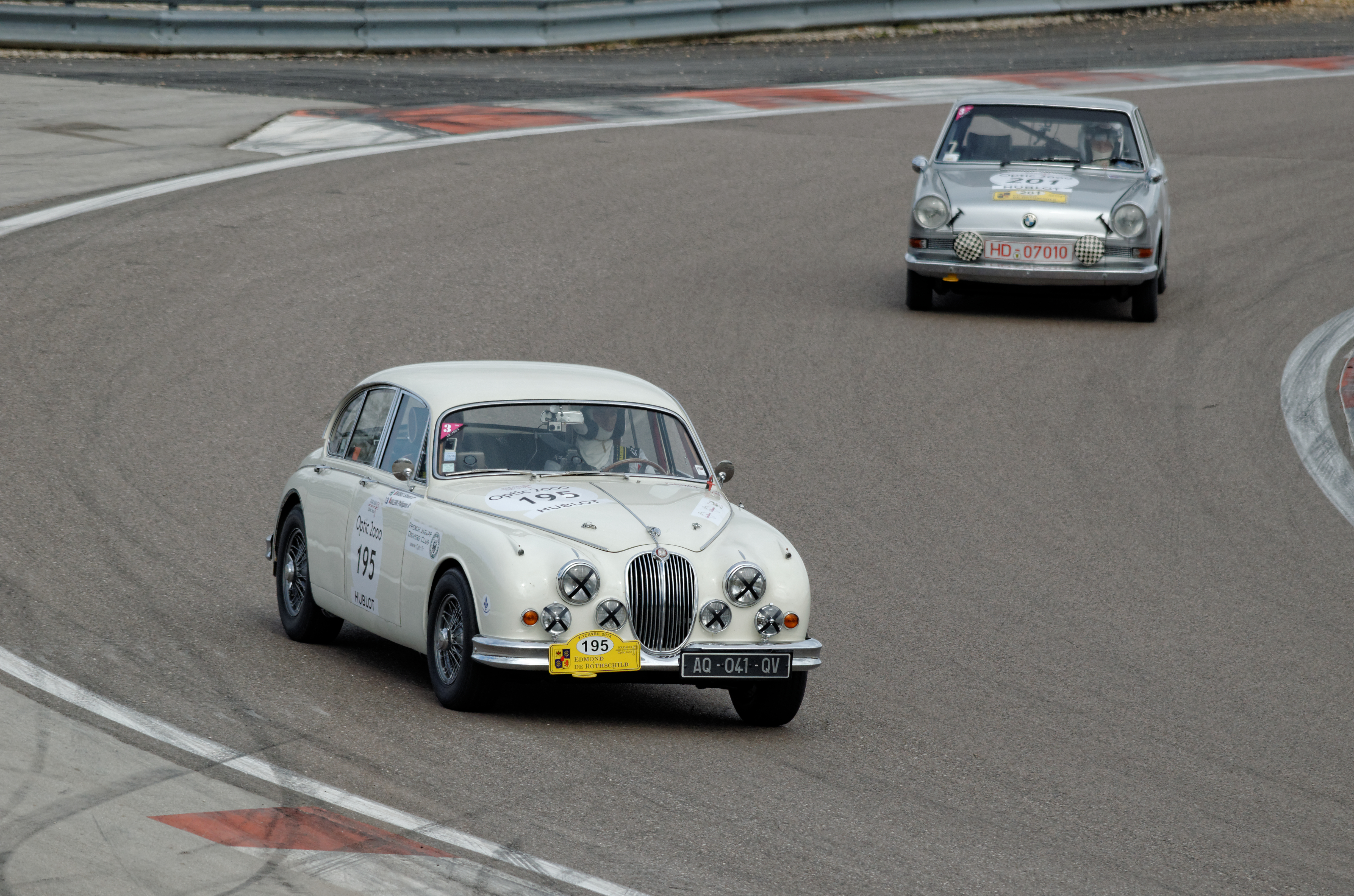 Jaguar MKII, Tour Auto 2014, étape sur le Circuit de Prenois.